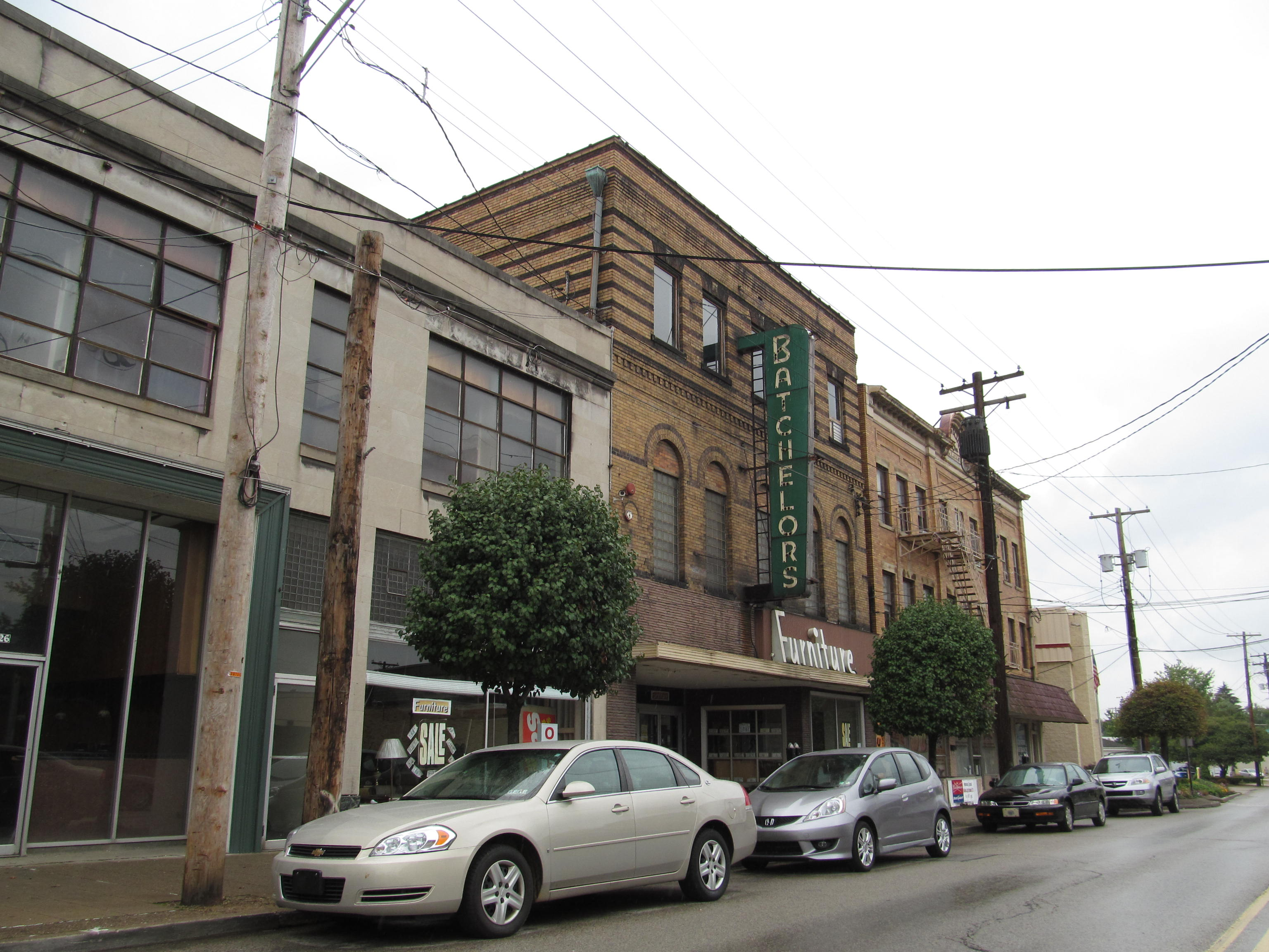 Monaca, Pennsylvania